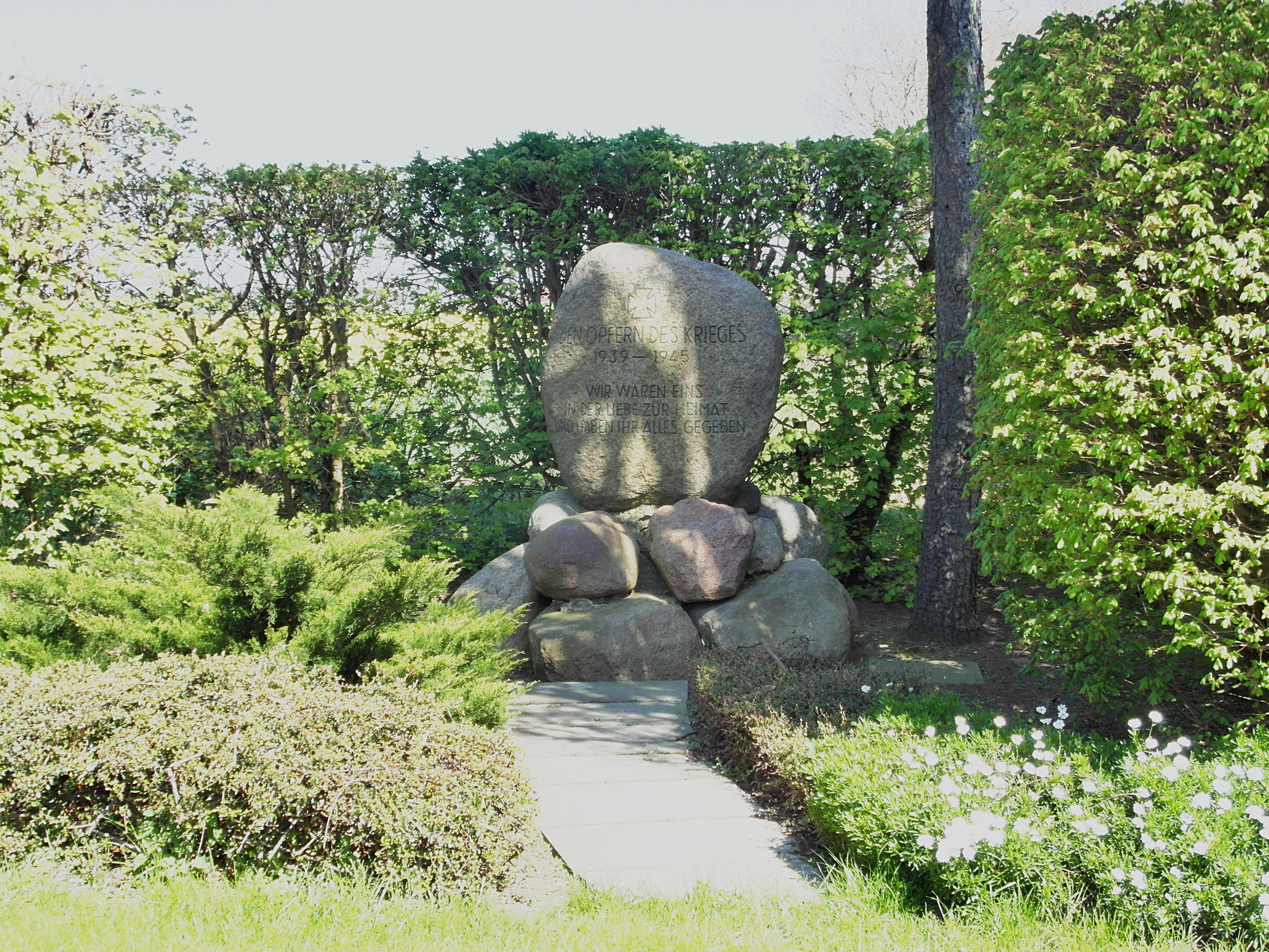 Vertriebenengedenkstein im Hemminger Stadtteil Ohlendorf in der Region Hannover. Inschrift „Den Opfern des Krieges 1939-1945. Wir waren eins in der Liebe zur Heimat und haben ihr alles gegeben.“